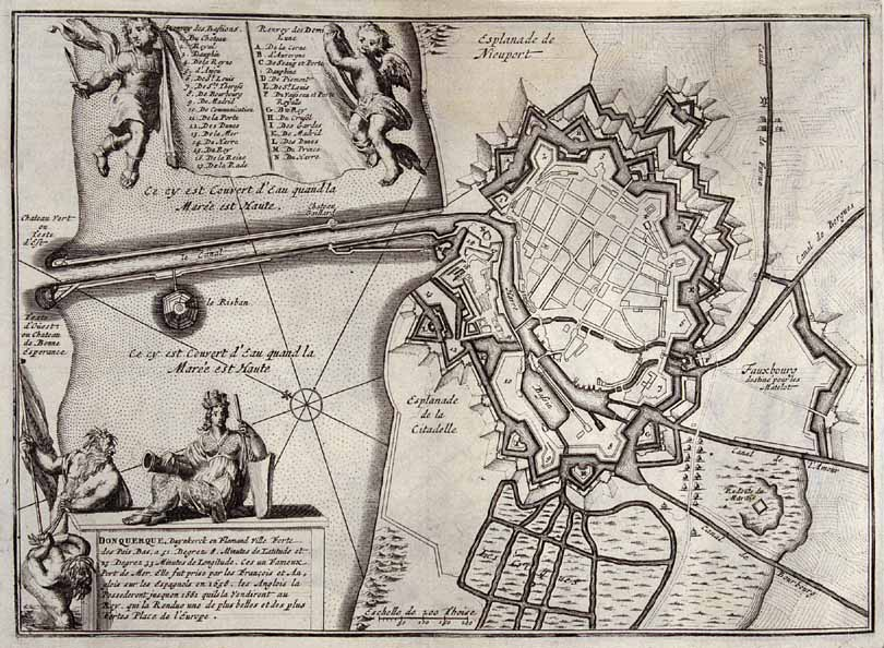 Dünkirchen, ab 1662 durch Vauban zur Festung ausgebaut. Public Domain